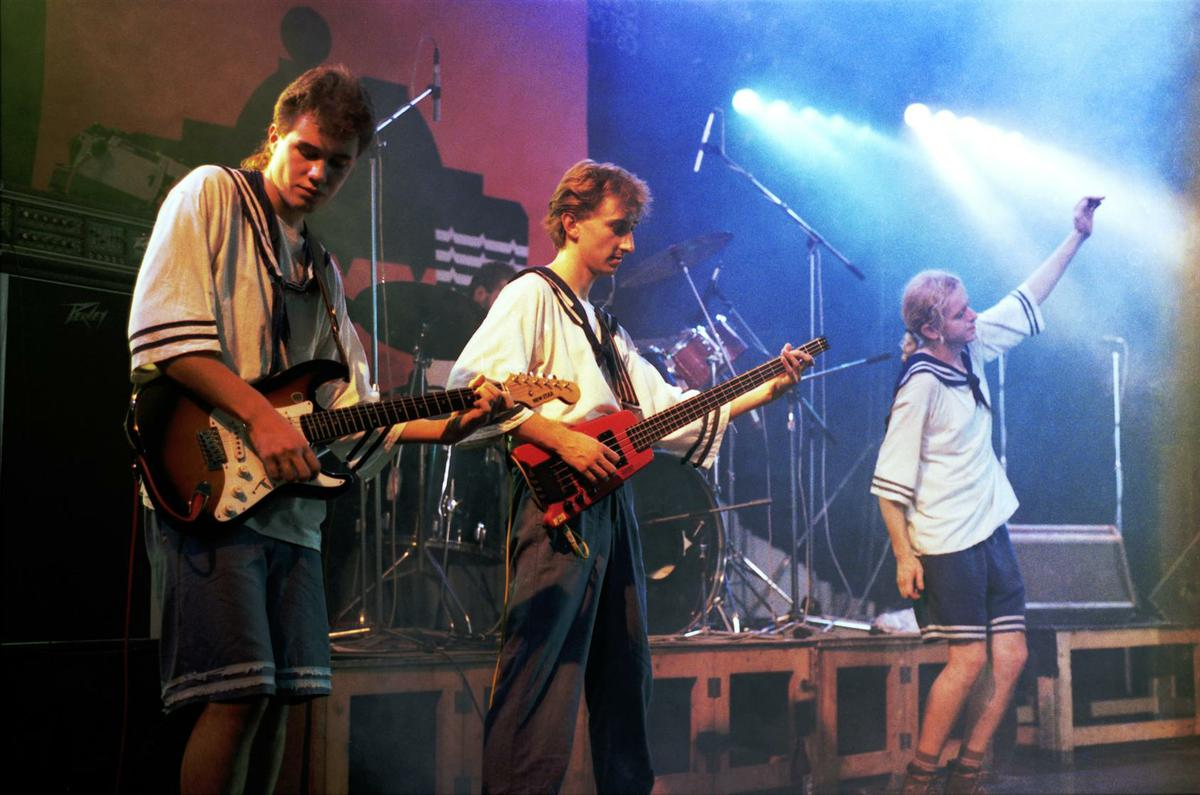 Mňága v době vydání alba "Furt rovně!" (1992). Zleva: Koutný, Nekuža, Fiala, v pozadí Mikuš.